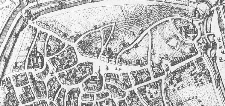 Detailausschnitt "Diebsmarckt" - heute Schillerplatz - Mainz aus u.g. Bild. Beschreibung: 24 = Der Diebsmarckt, 12 = Weÿsfrawen Closter, 13 = S. Agnes Closter